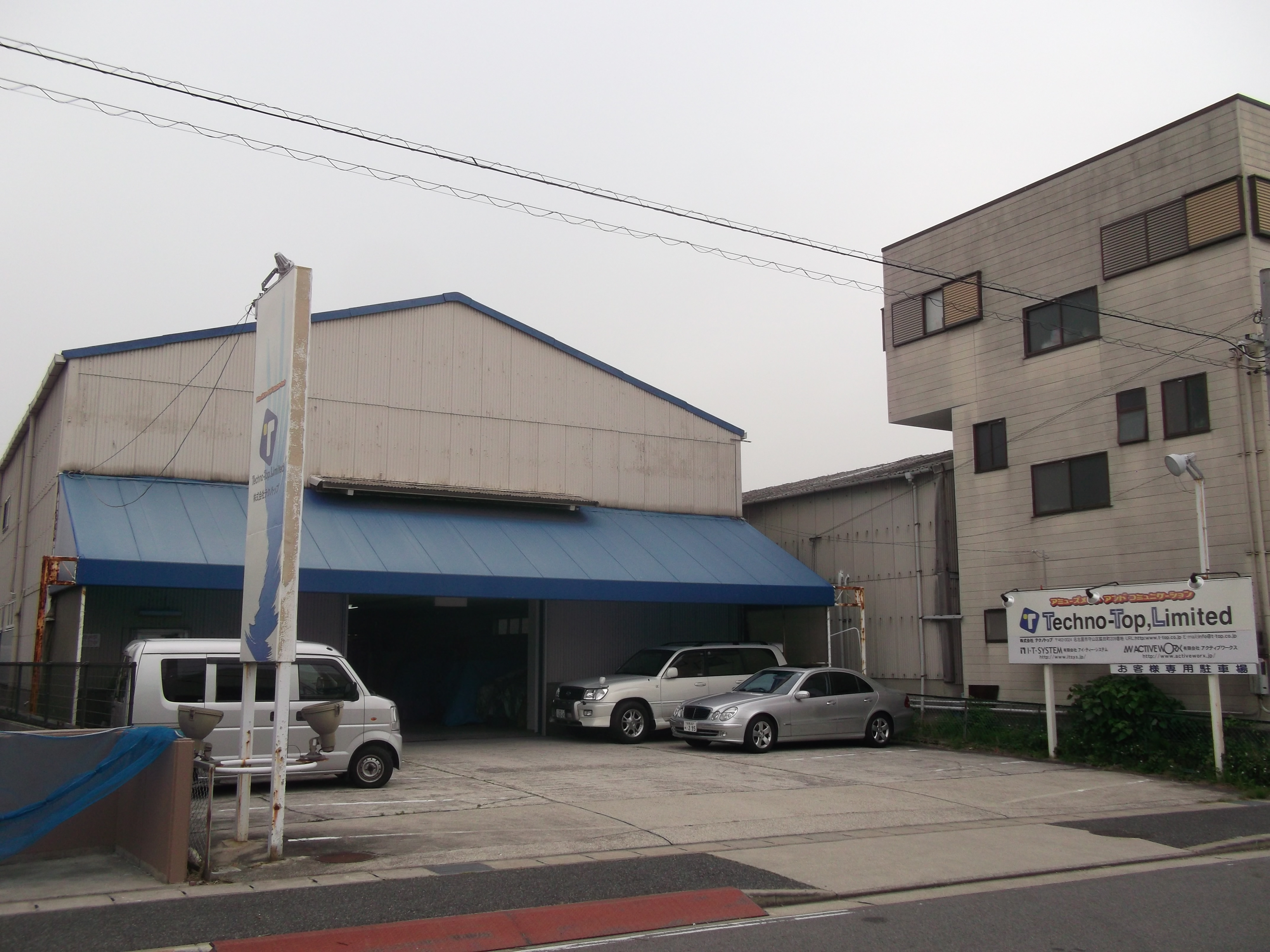 名古屋市守山区脇田町のテクノトップ本社を西側公道北側より撮影